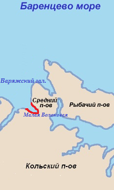 Малая Волоковая губа на карте северо-западной части Кольского полуострова